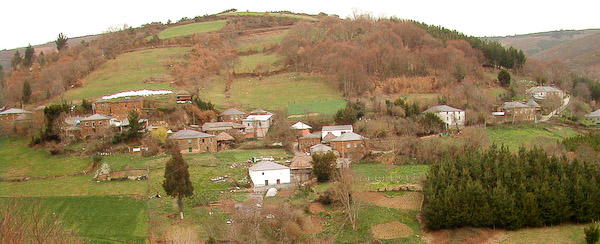 Vista de Molmeán